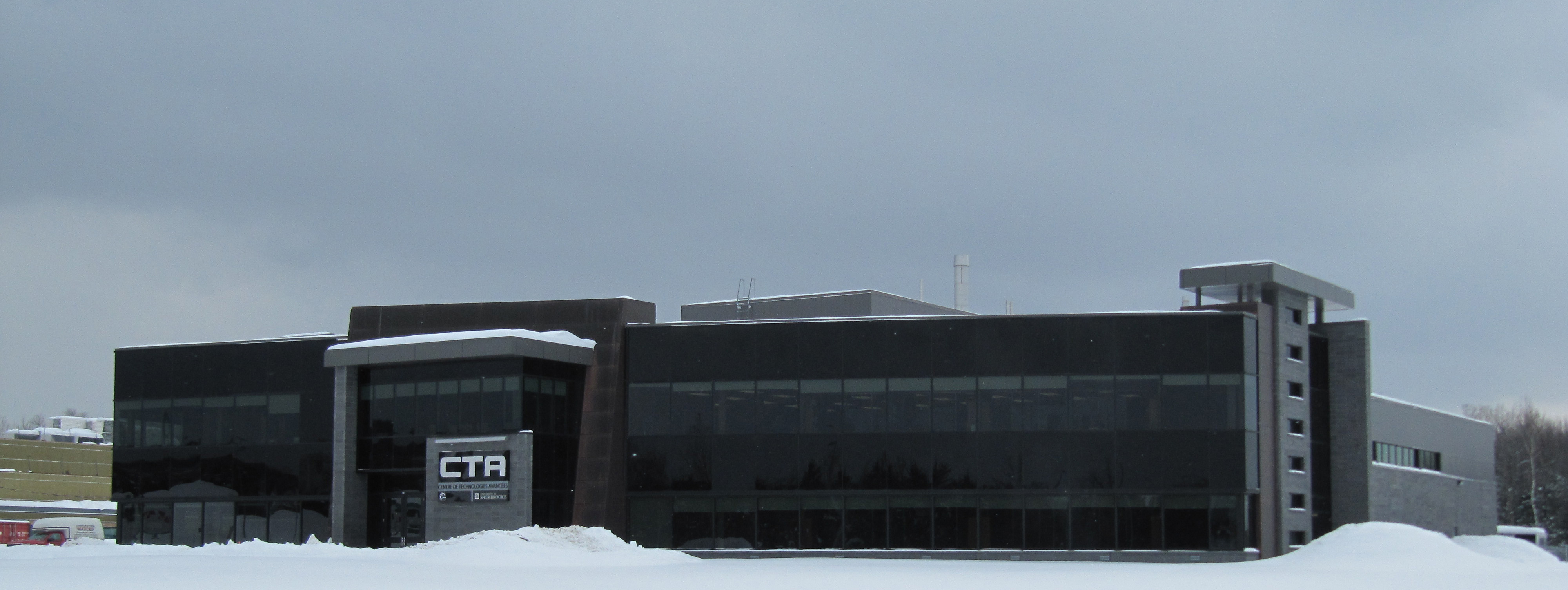 Centre de technologies avancées BRP - Université de Sherbrooke